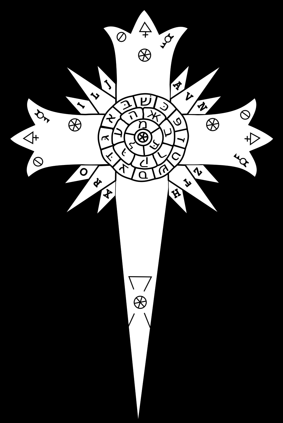 croix de la congrégation de l'ombre dans D.Gray-man